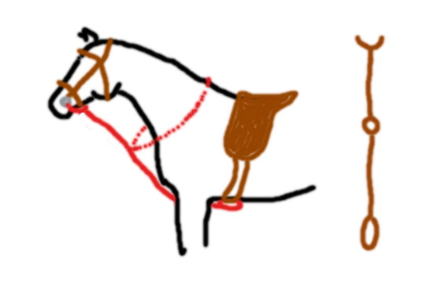 Stosszügel